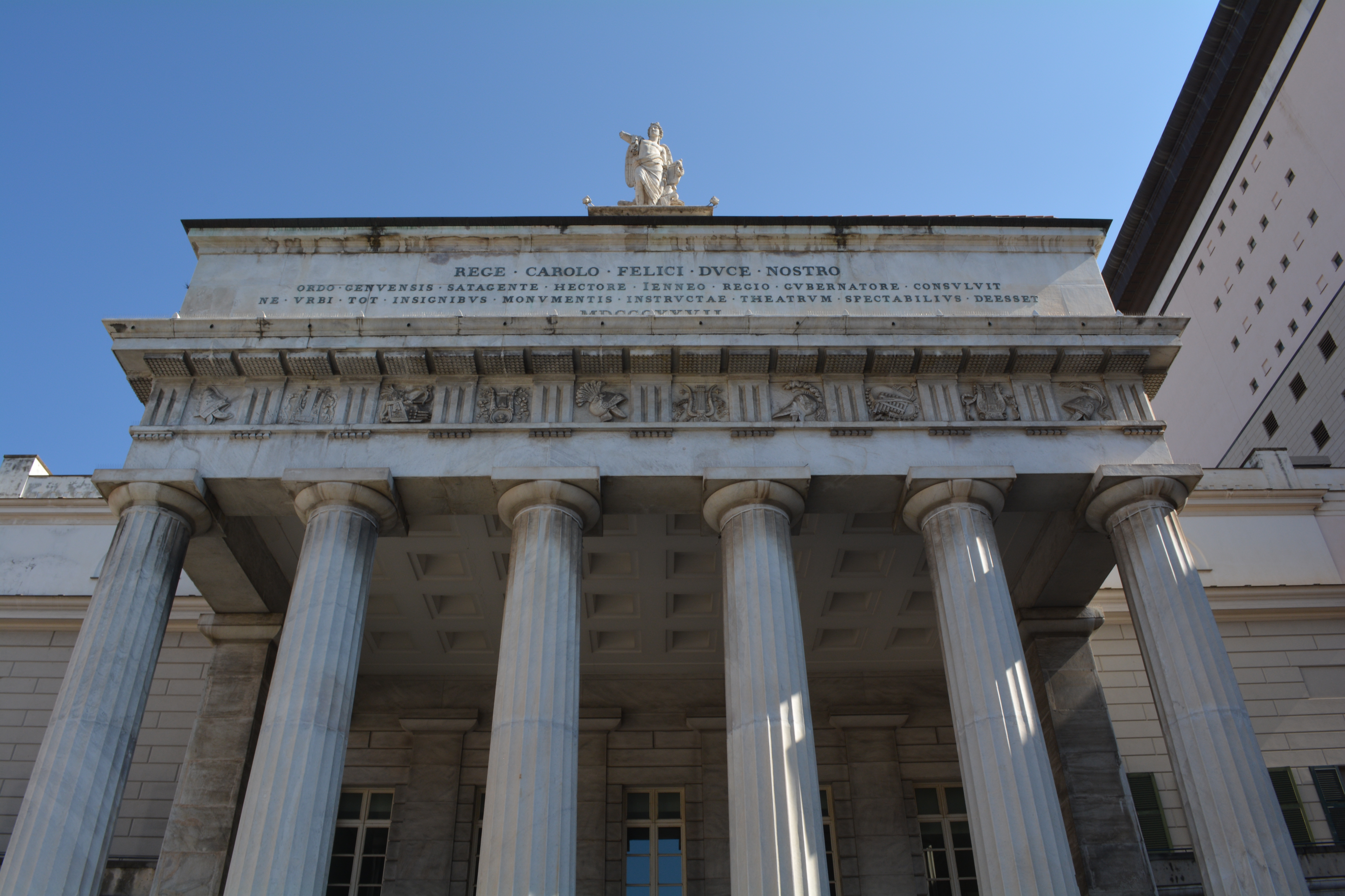 Teatro Carlo Felice This is a photo of a monument which is part of cultural heritage of Italy.